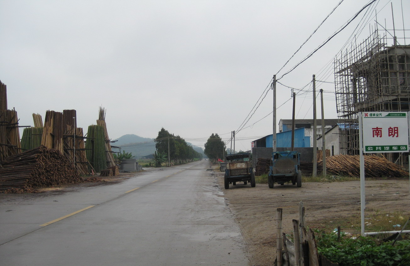 X581新会古井段